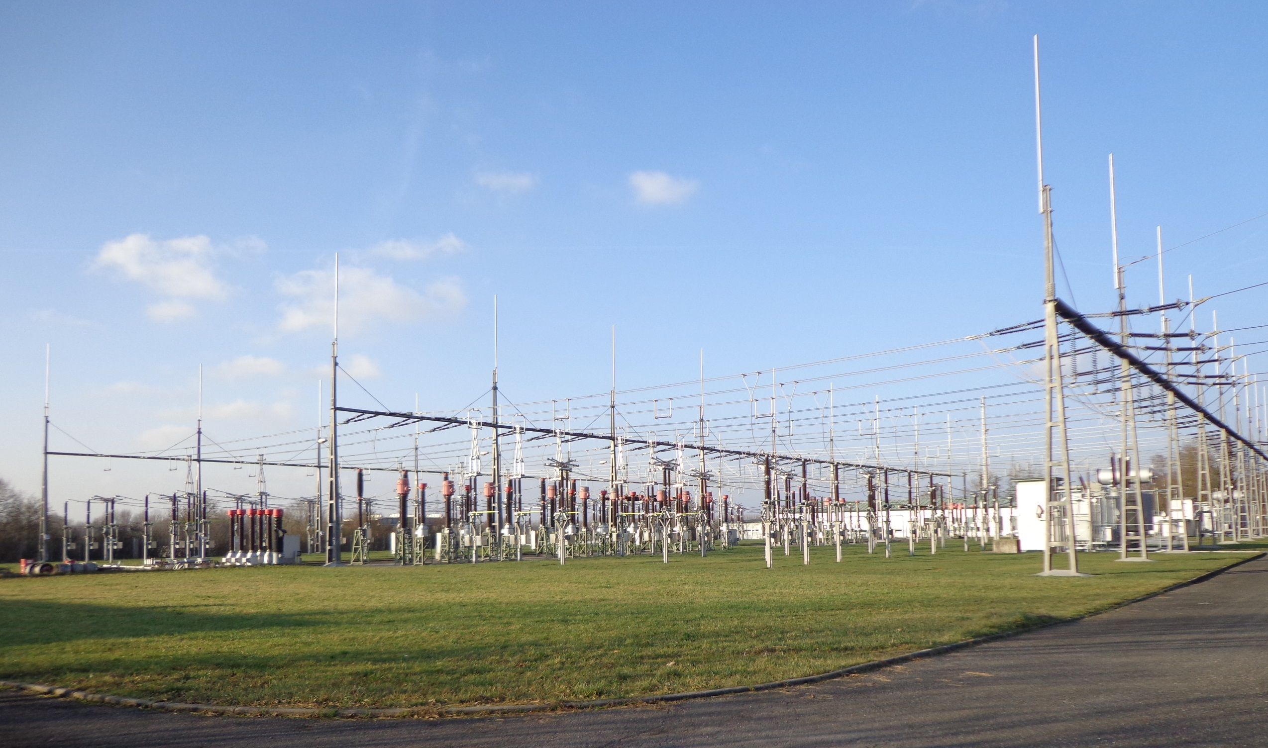 Umspannwerk Schärding in Badhöring (Sankt Florian am Inn), Freiluft-Schaltanlage am Kraftwerk Schärding-Neuhaus